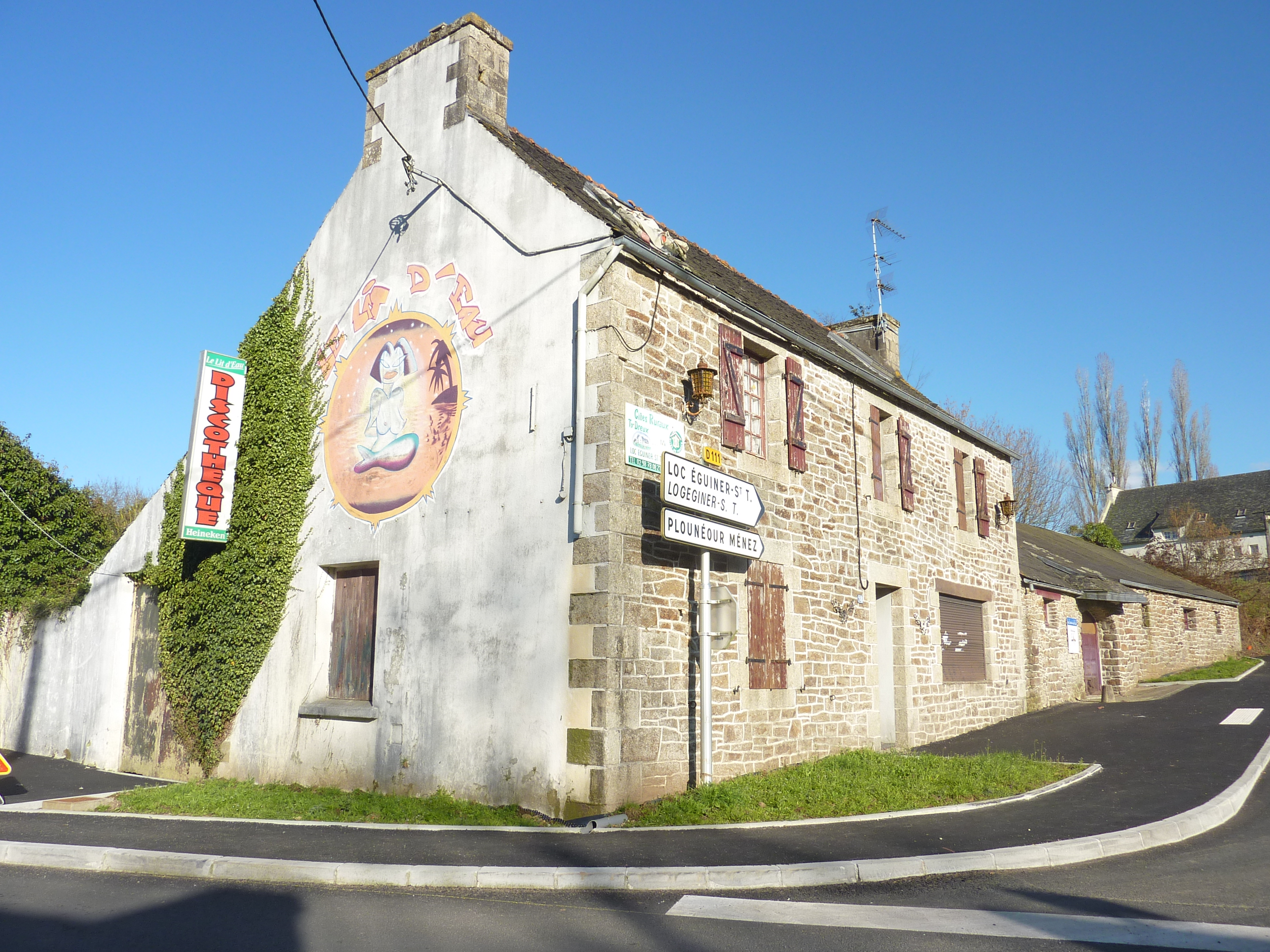 Loc-Eguiner-Saint-Thégonnec : l'ancienne boite de nuit "Le lit d'eau"